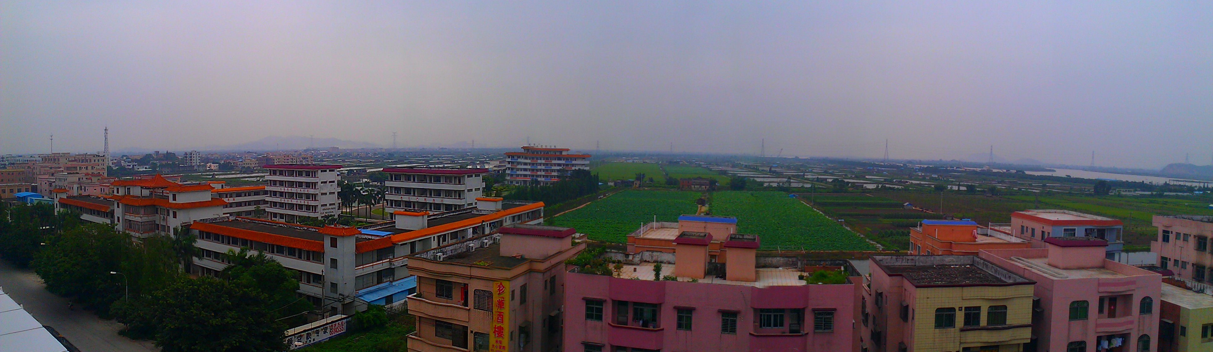 中文（香港）: 江門市大鰲鎮Panorama照片1